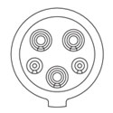 Presa tipo 1